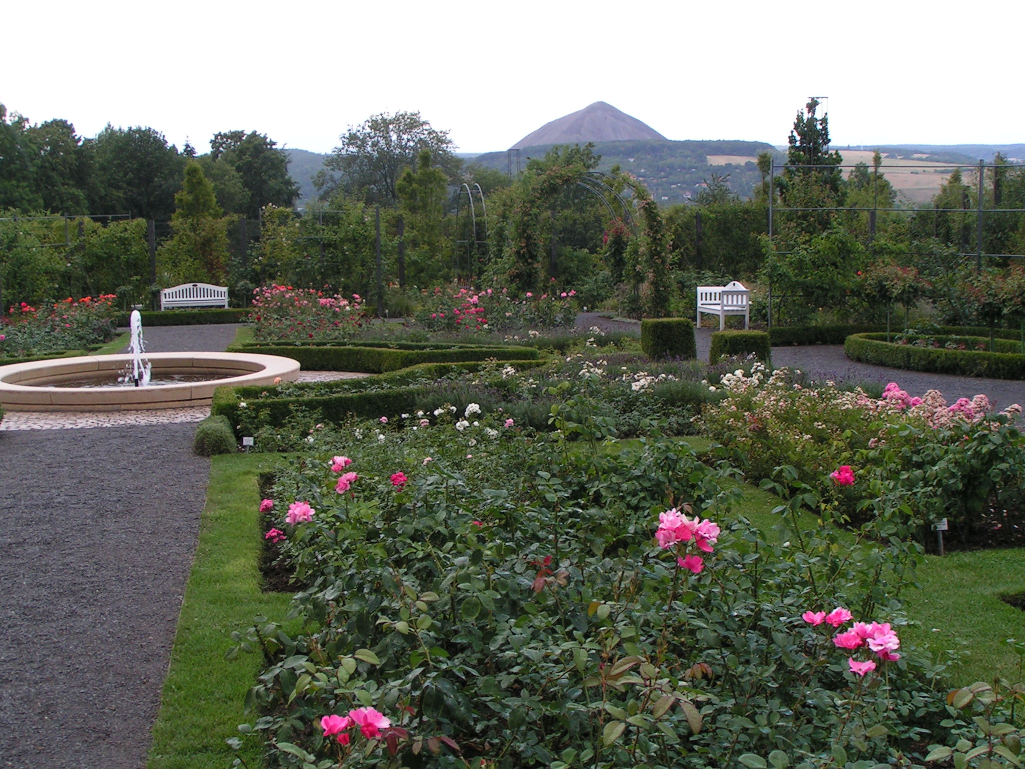 Europa-Rosarium Sangerhausen